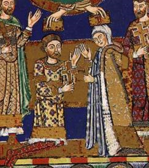 Evangeliář Jindřicha Lva